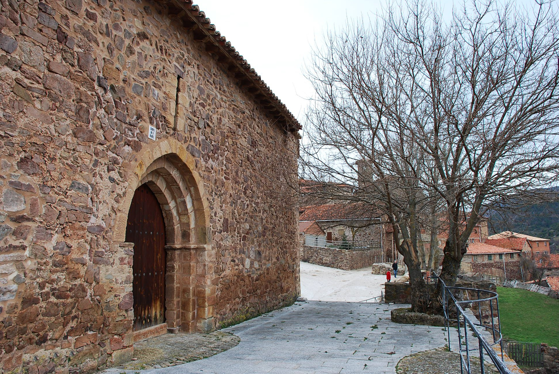 Ermita de San Mamés en Montenegro de Cameros, Soria - España.